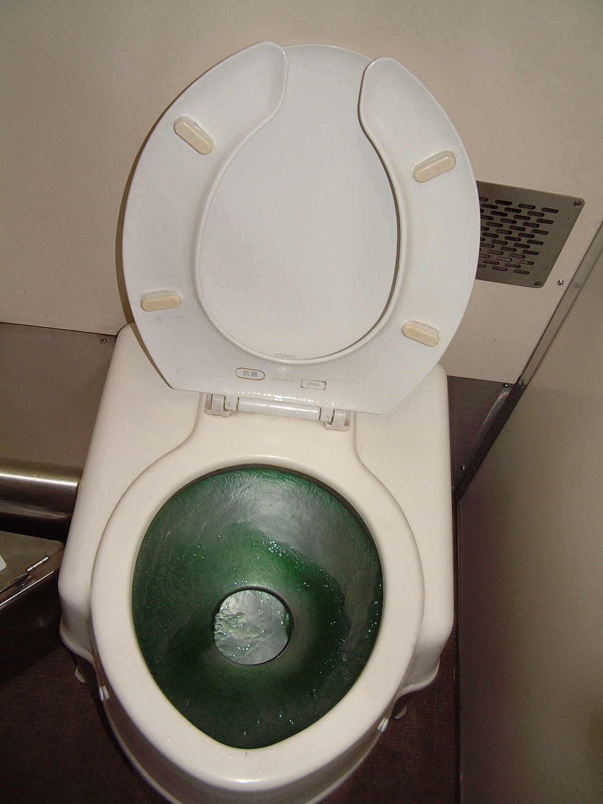 JR北海道キハ54形気動車(キハ54 526)の洋式便所(循環式汚物処理装置付)